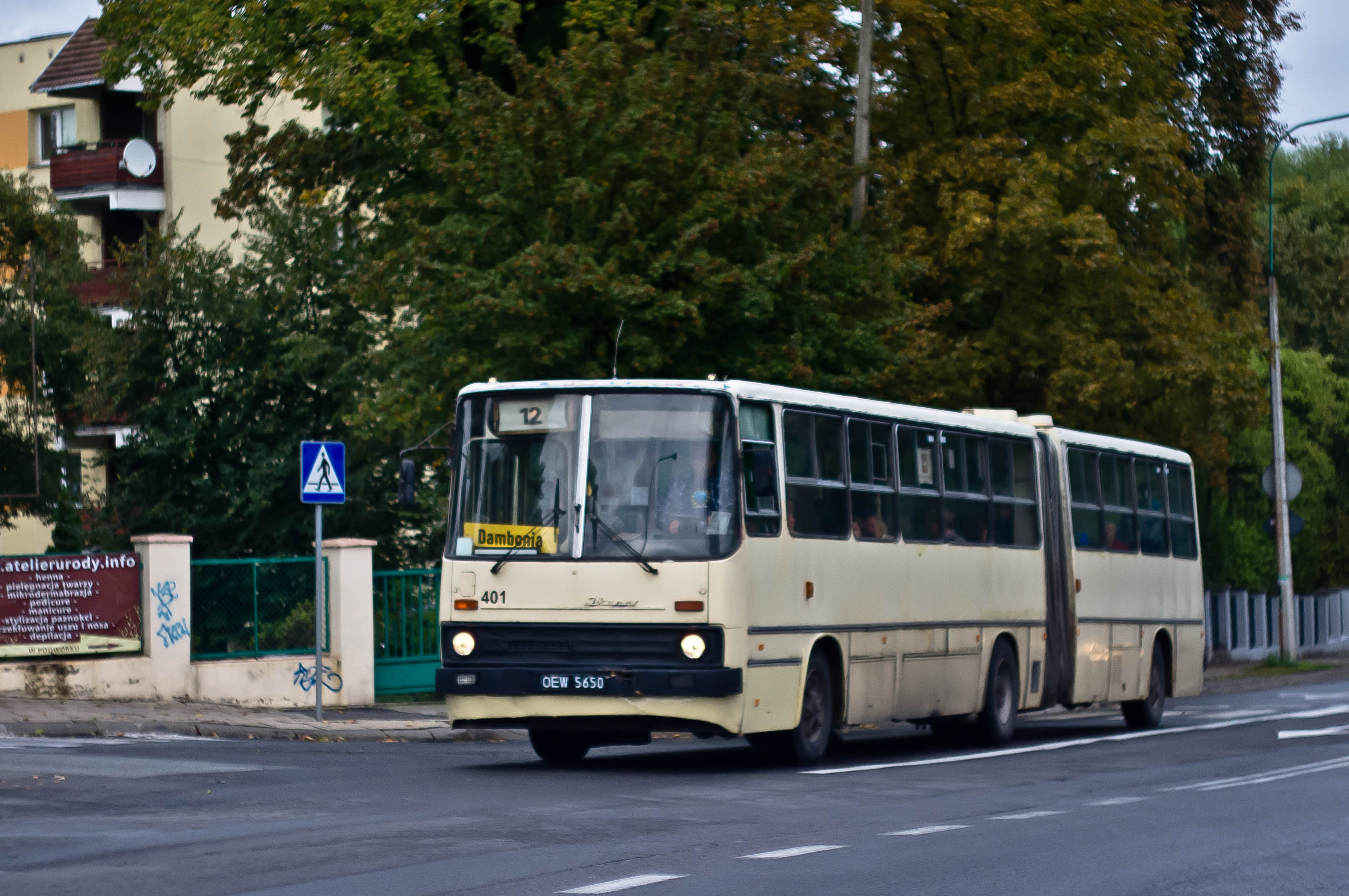 Ikarus o nr. 401 na ul. Niemodlińskiej w Opolu.